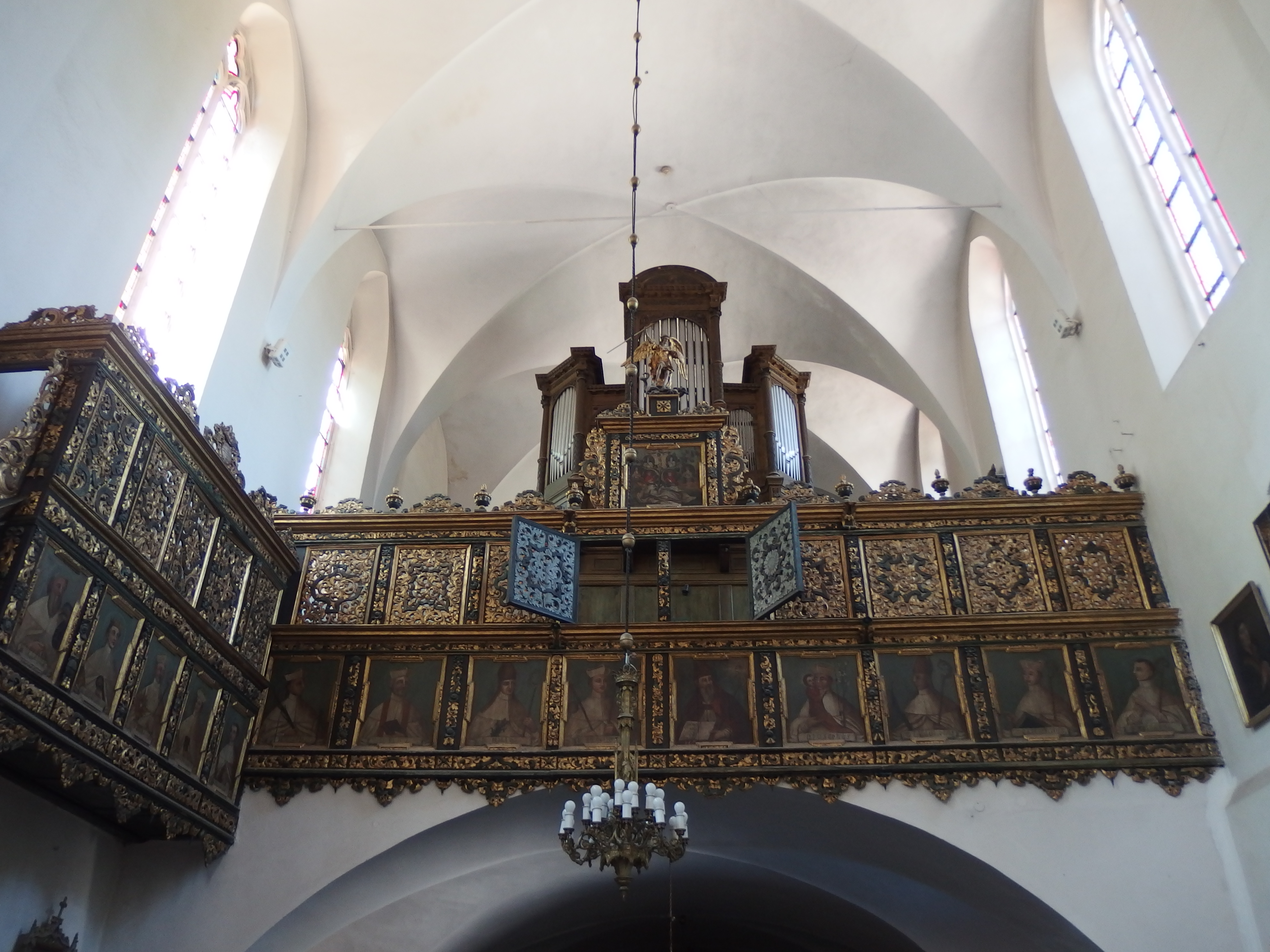 Żukowo, kościół, ob. par. rzym.-kat. p.w. Wniebowzięcia NMP, 1209, XIII/XIV, XVII